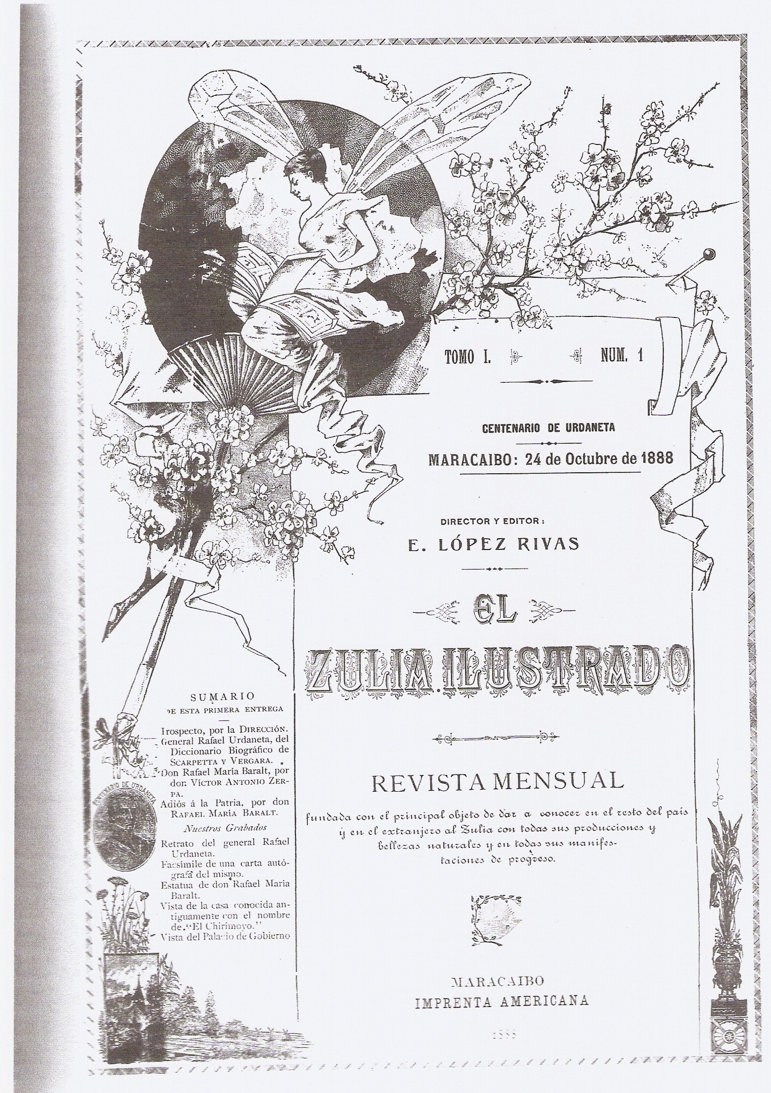 portada de El Zuia Ilustrado